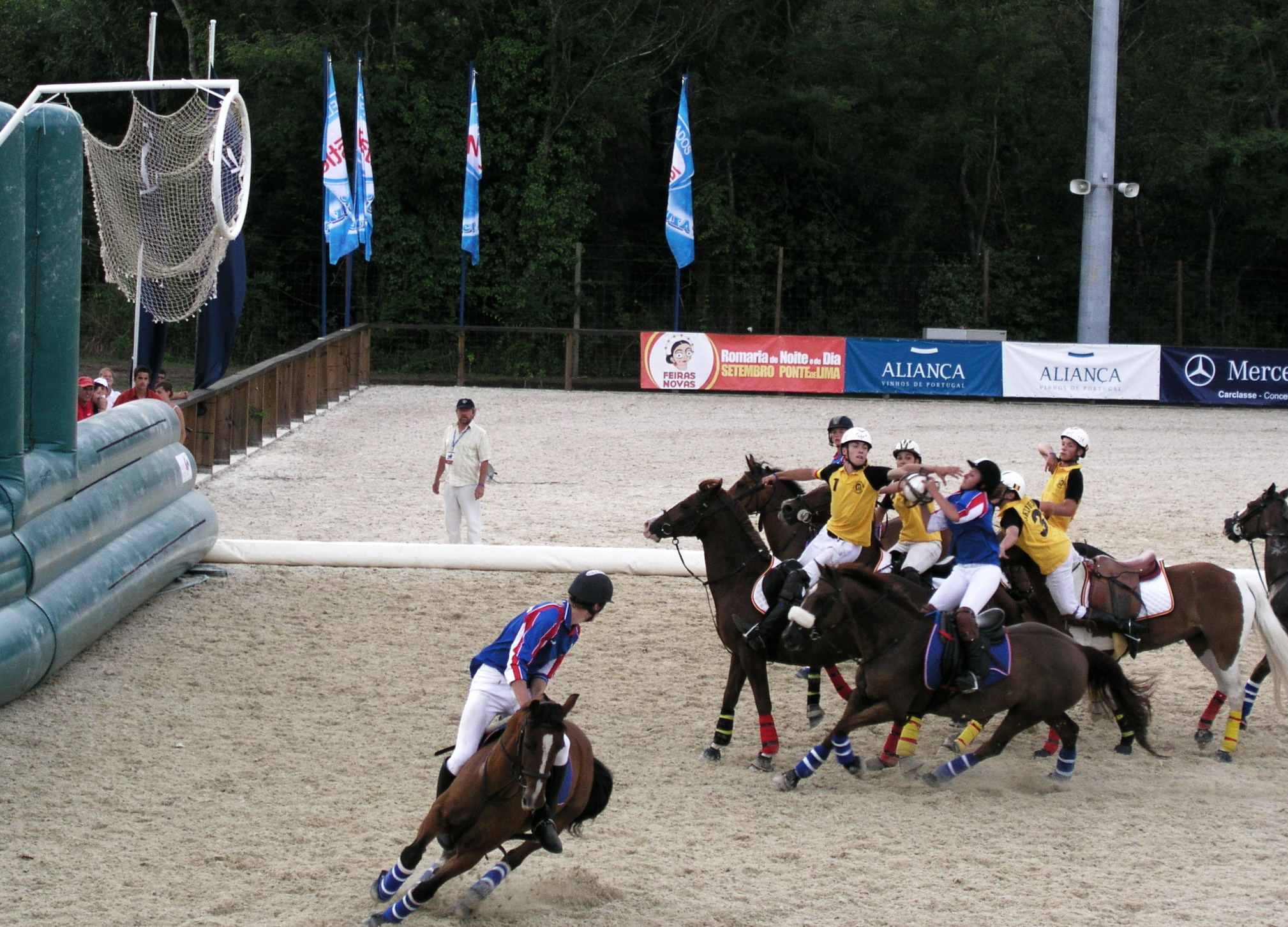 FIHB-Horsball World Cup: Campeonato da Europa Juniores (Sub-16 anos), Bélgica-Inglaterra, Ponte de Lima 2008, Portugal